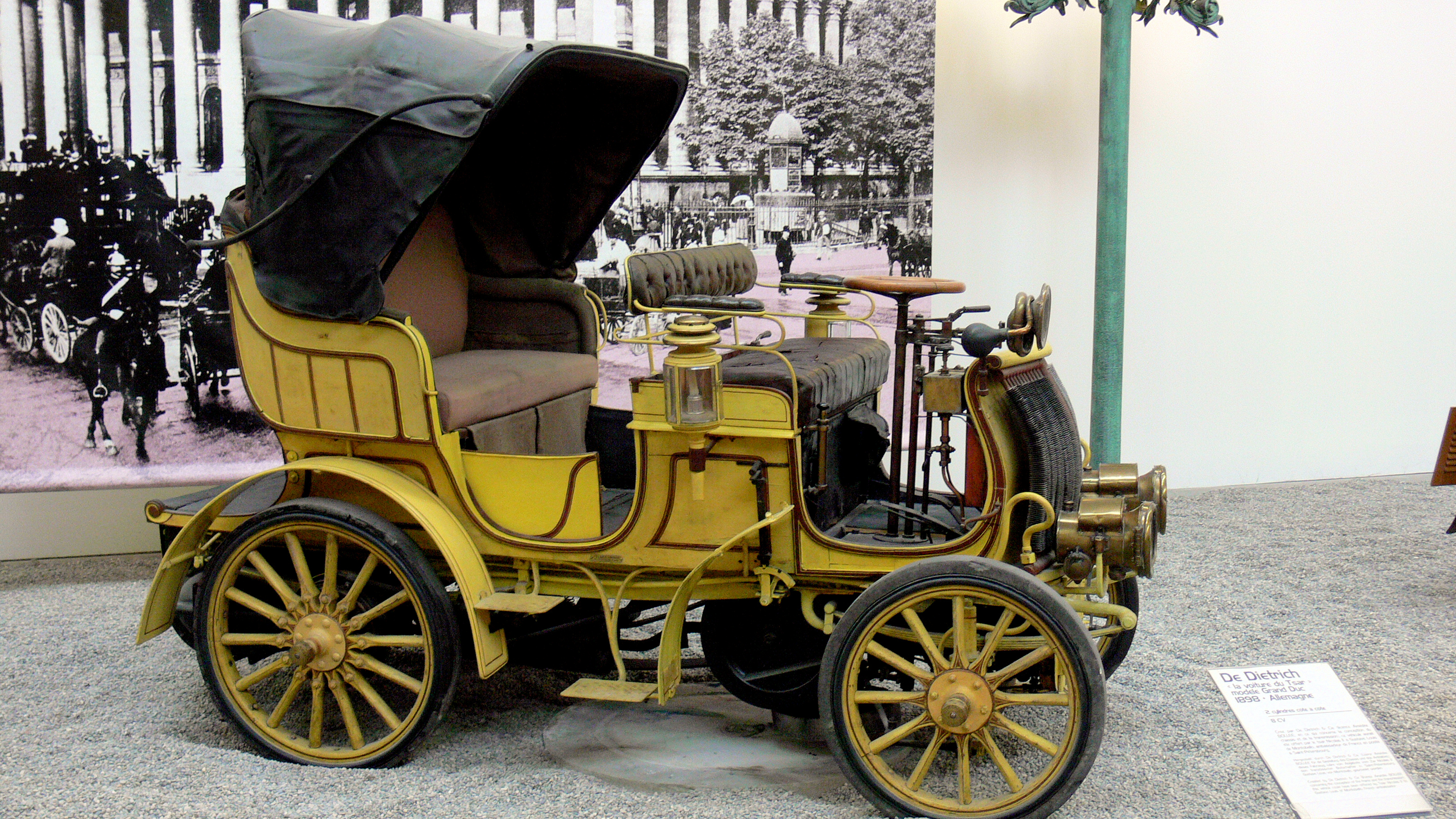 De Dietrich Grand Duc (1898) in Musée National de l'Automobile (Mulhouse)